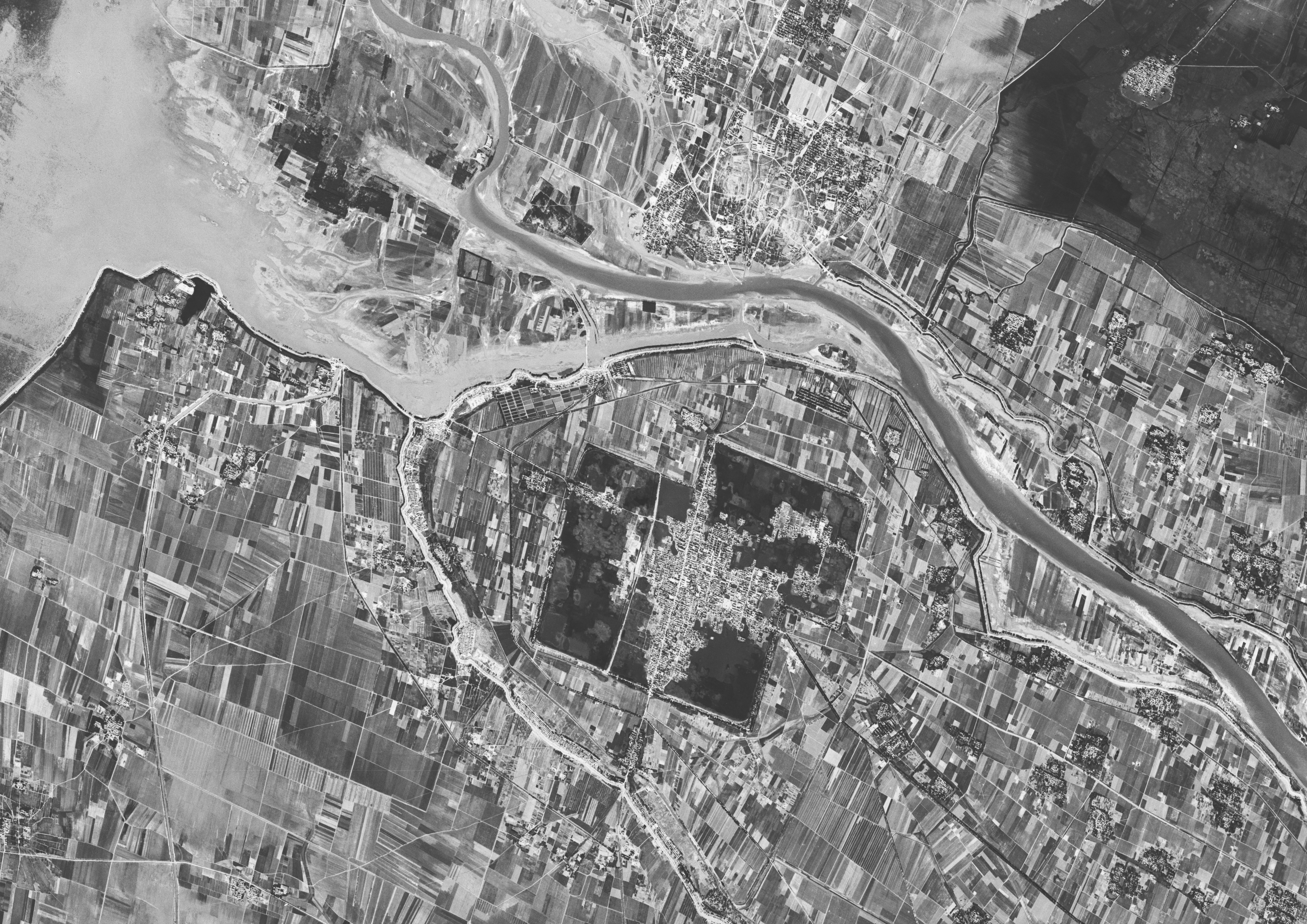 1971年9月原东平州城（时为东平县城）及周边地区卫星影像。